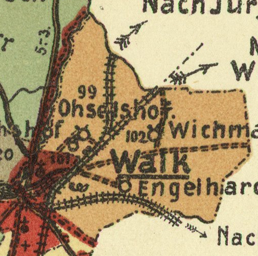 Valga kihelkonna mõisad 1904. aasta kaardil.